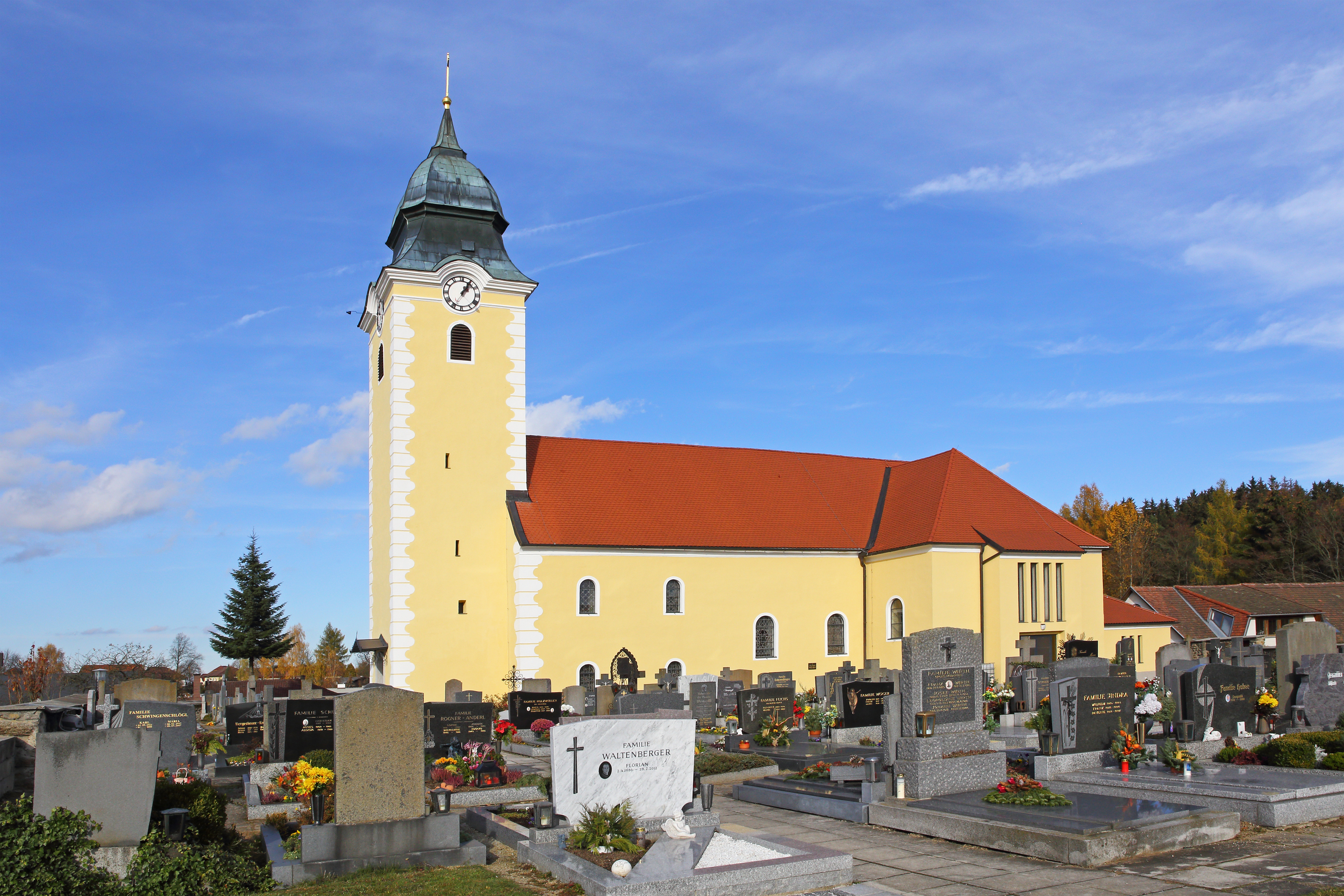 Die kath. Pfarr- und Wallfahrtskirche hl. Michael in Waldenstein